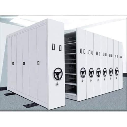 Фото мобильной архивной конструкции